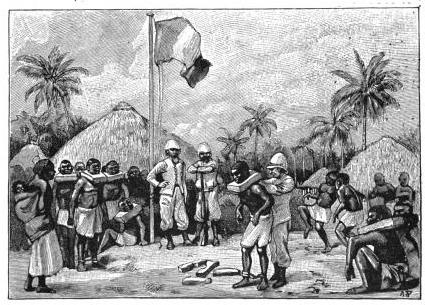 Illustration tirée de Histoire de France, cours élémentaire, Ernest Lavisse, Armand Colin, 1913, page 183 de l'édition Heath de 1919.